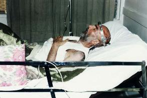 Ahmad Moftizadeh nach seiner Freilassung aus dem Gefängnis kurz vor seinem Tod. 1993